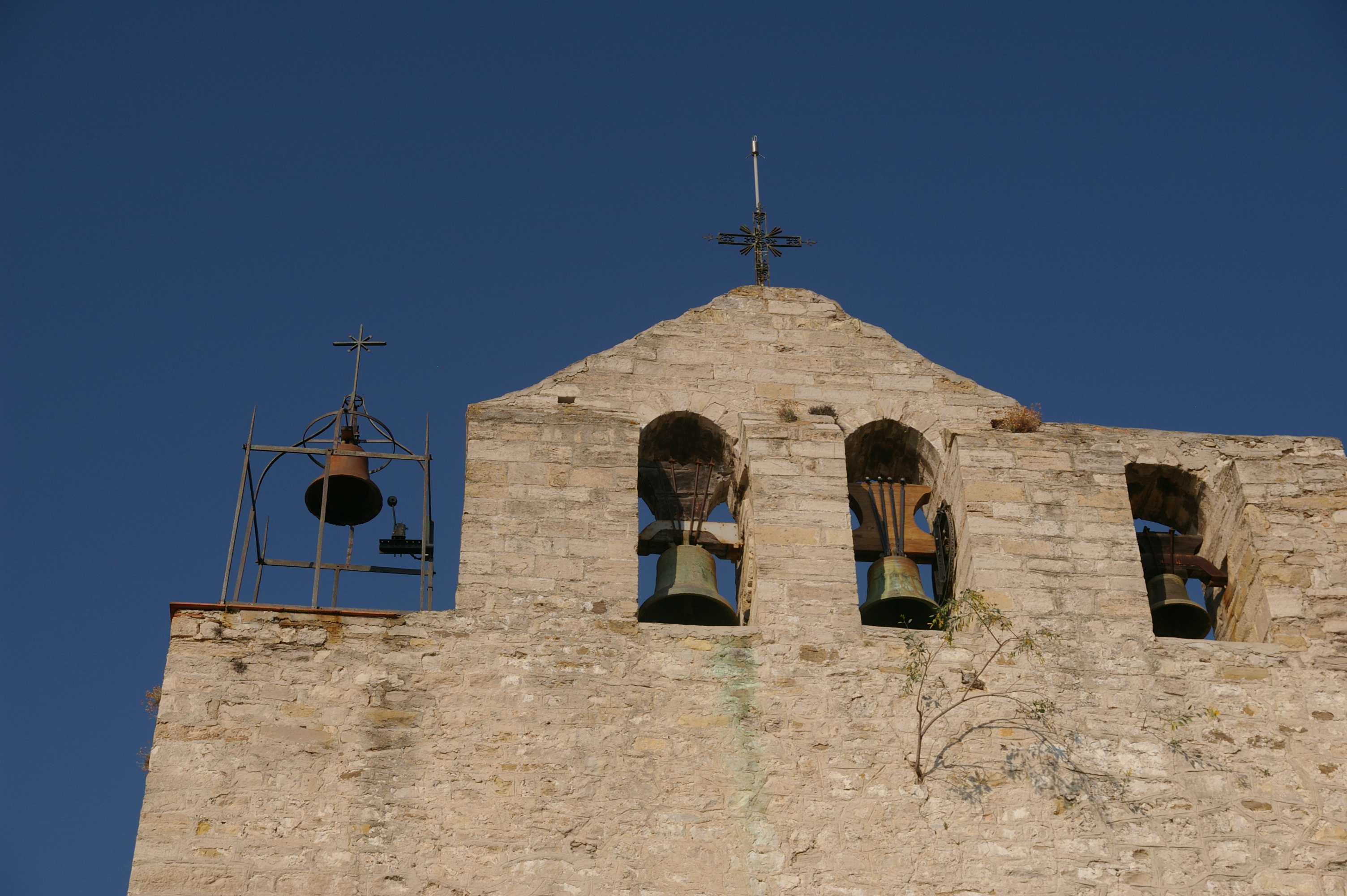 Gros plan sur les cloches de l’église du Castellet